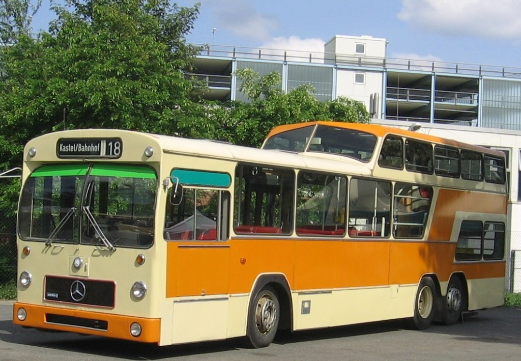 Bus-Ausstellung Betriebshof Frankfurt am Main Rebstock Bitte um Typisierung / Identifizerung.